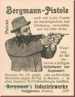 Bergmann